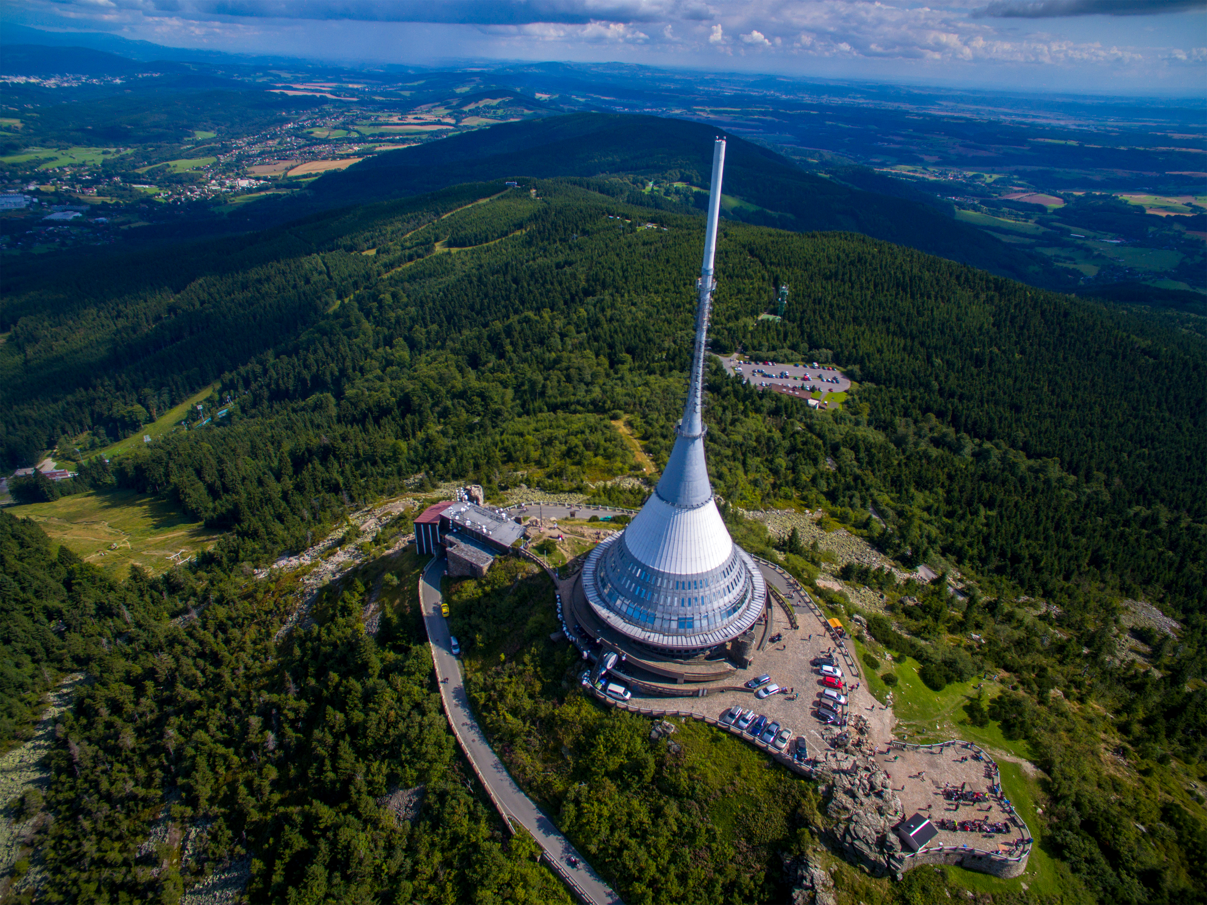 Pohled na Ještěd spolu s Ještědkou